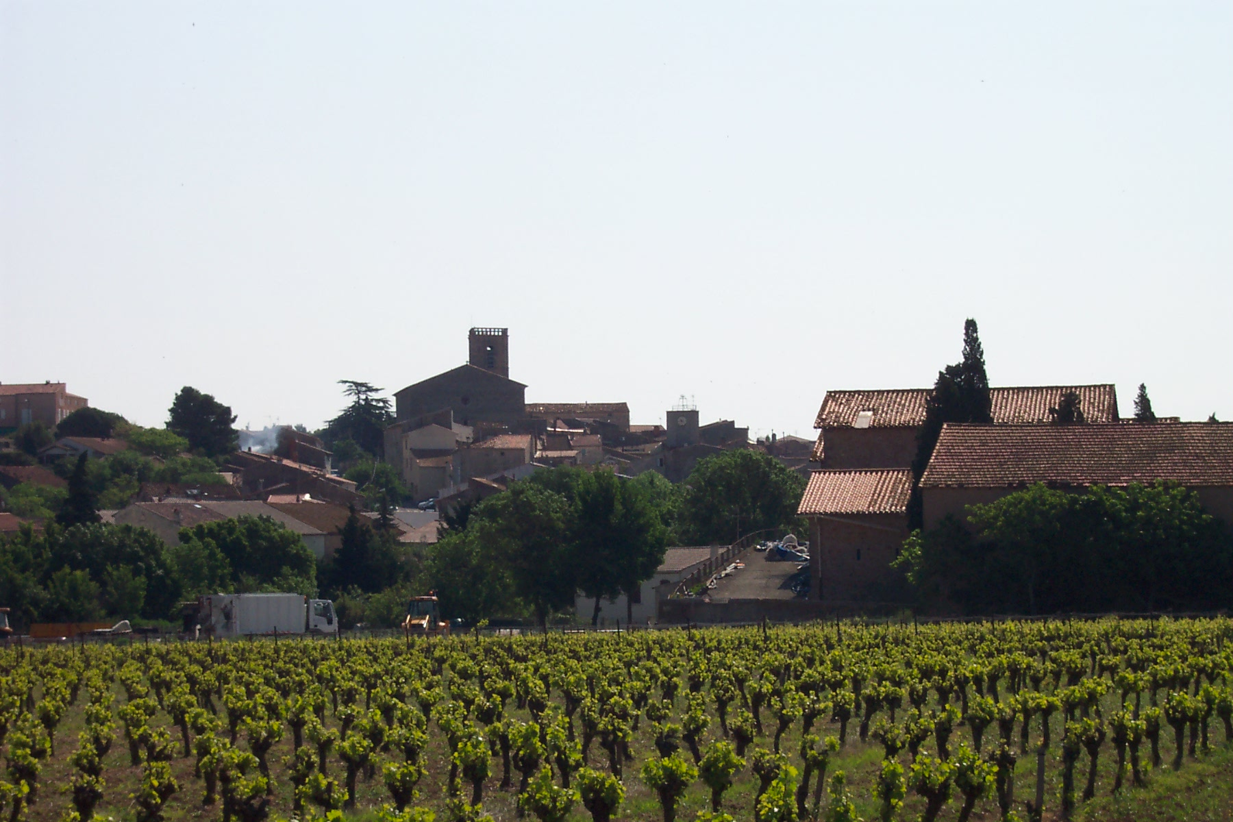 Vue générale du village